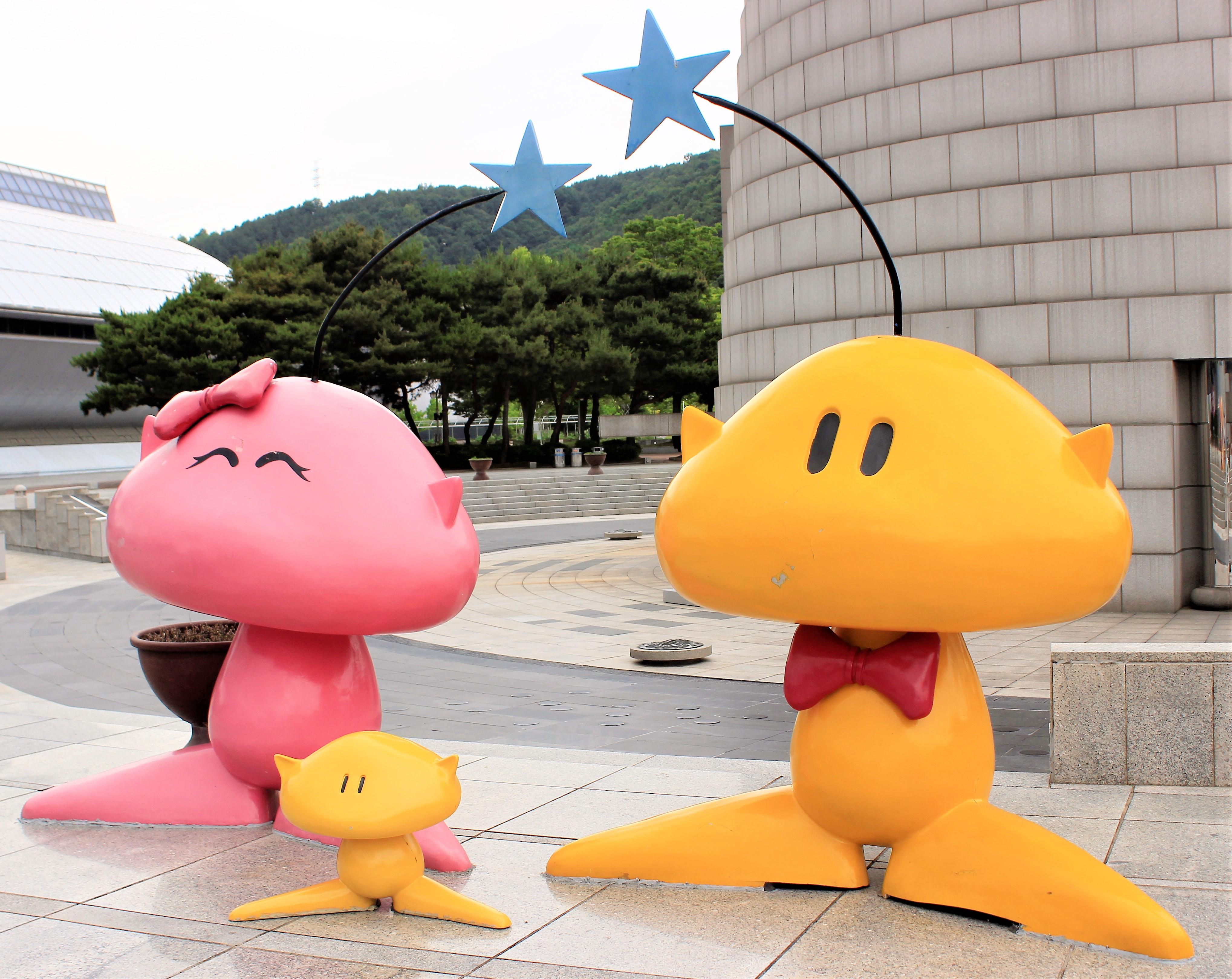 1993 대전 엑스포 마스코트였던 꿈돌이와 꿈순이